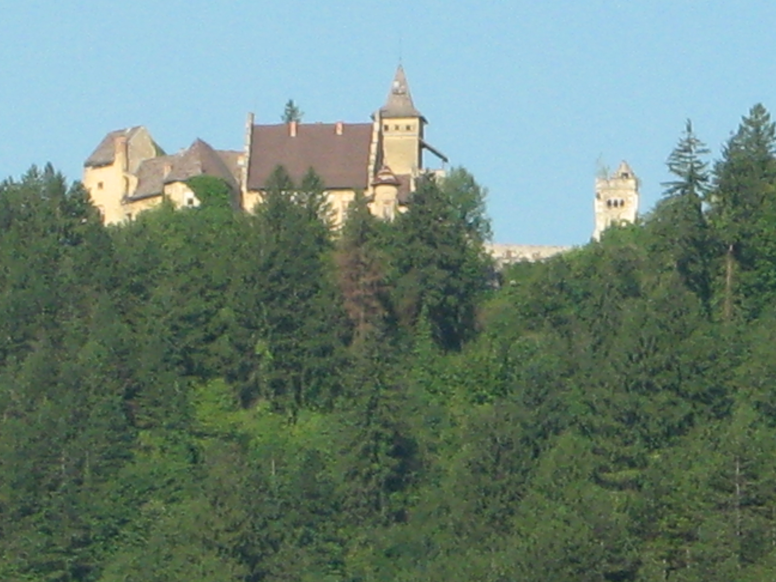 сам сам сликао